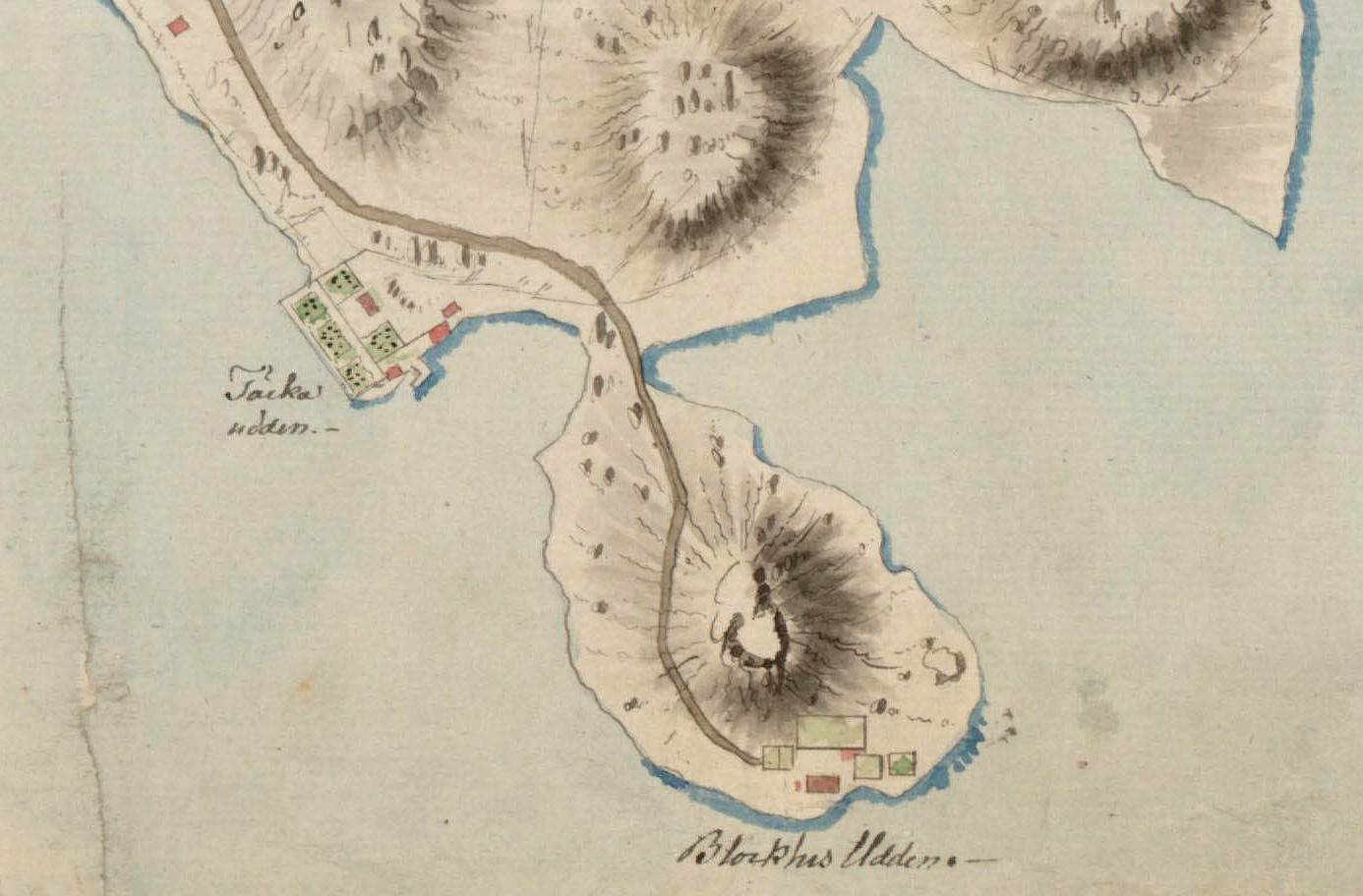 HK 1:4. Karta över Djurgården från år 1801 (del Blockhusudden och Täcka udden)